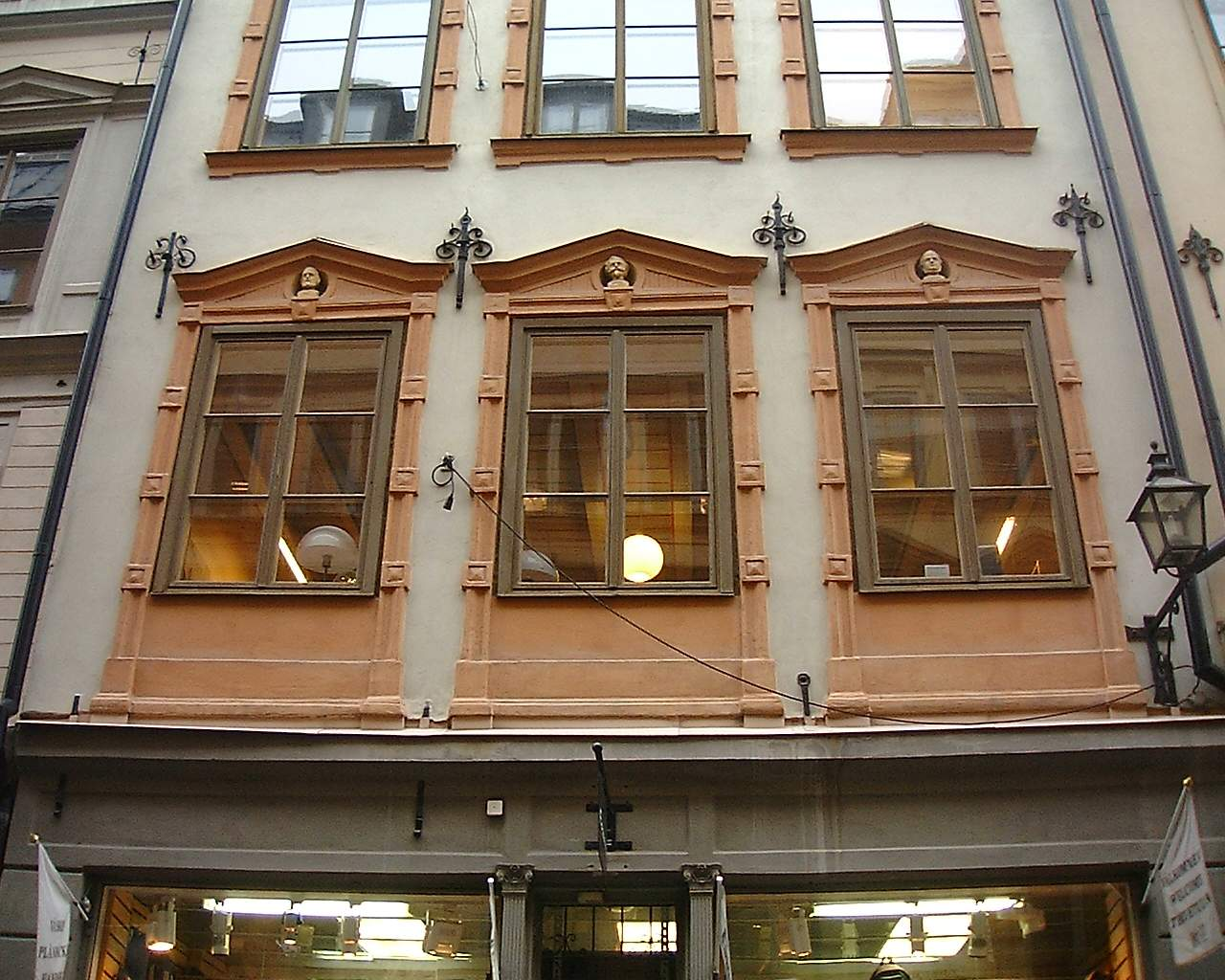 Västerlånggatan, Gamla stan, Stockholm. "Huset på tomt nr 7 (Västerlånggatan 13, Prästgatan 12) uppfördes under 1600-talet. I fasaden mot Västerlånggatan insattes under 1800-talet byster av Viktor Emanuel, Garibaldi och Cavour ovanför fönstret i första våningen.": Källa:Riksantikvarieämbetet